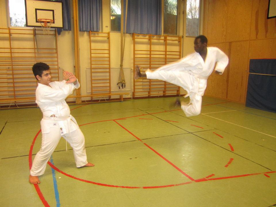 tung Boy Sarr